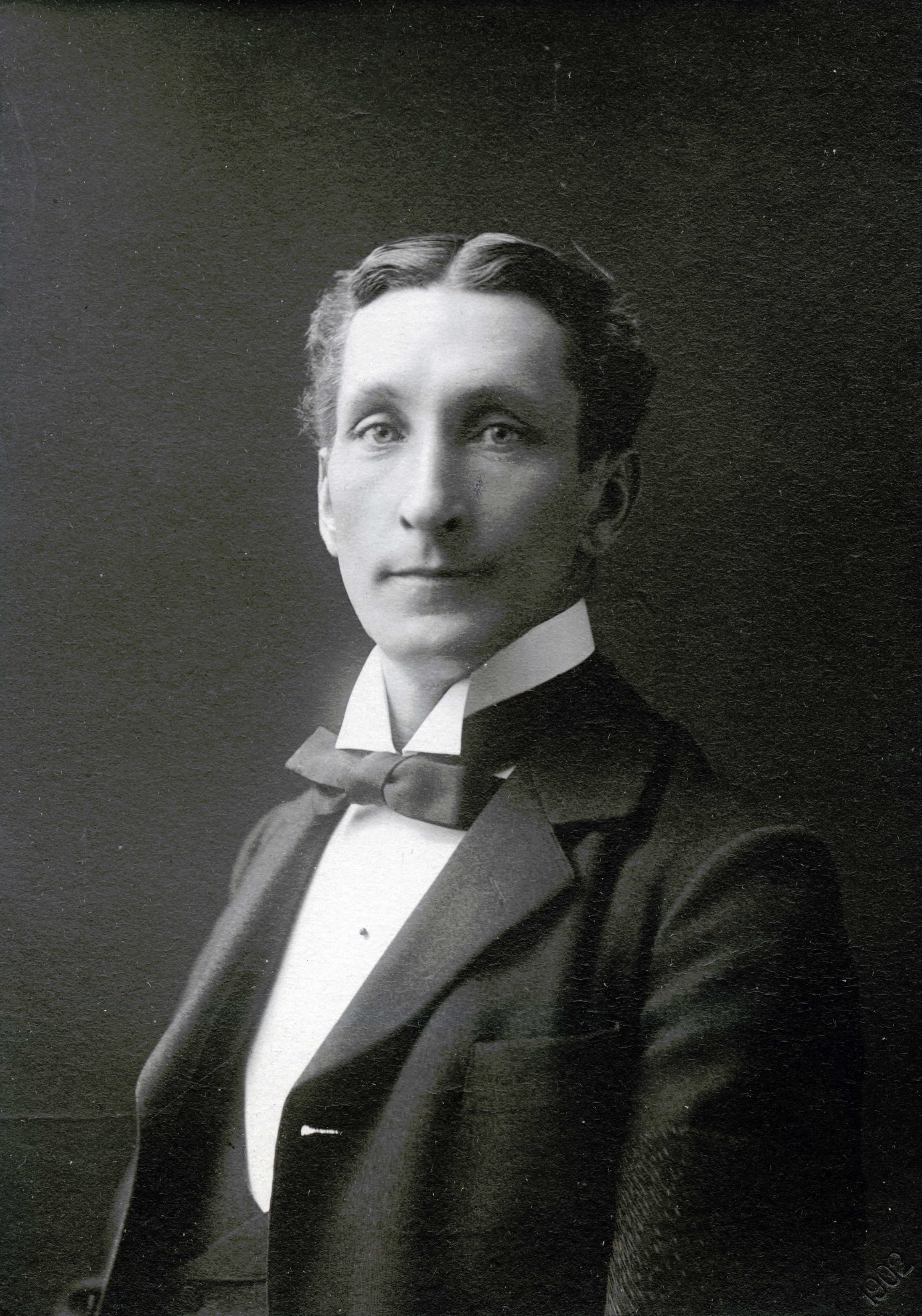 Ernst Fastbom, Folkteatern i Stockholm 1901